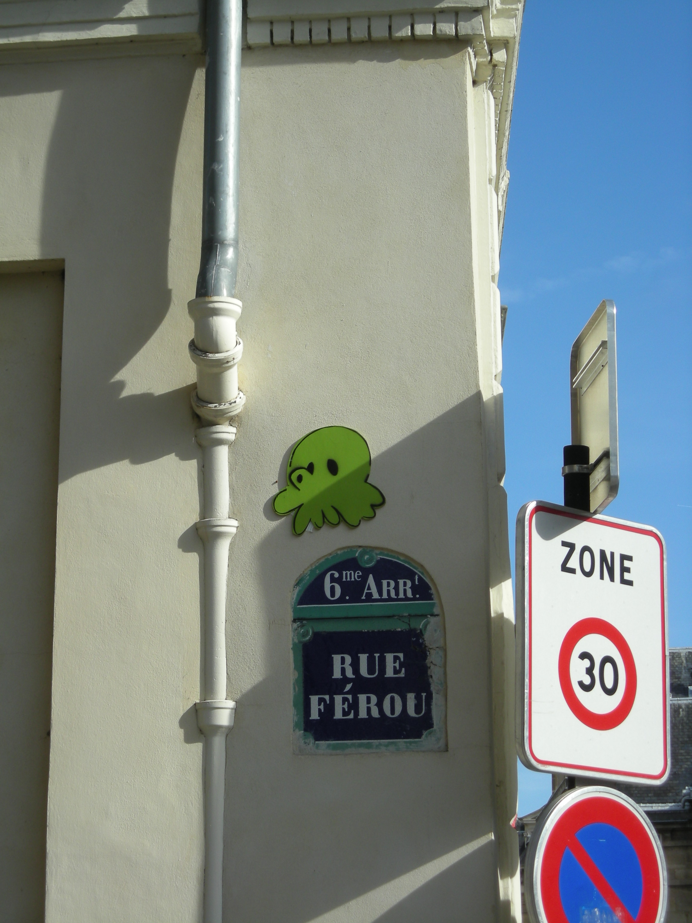 Rue Férou.